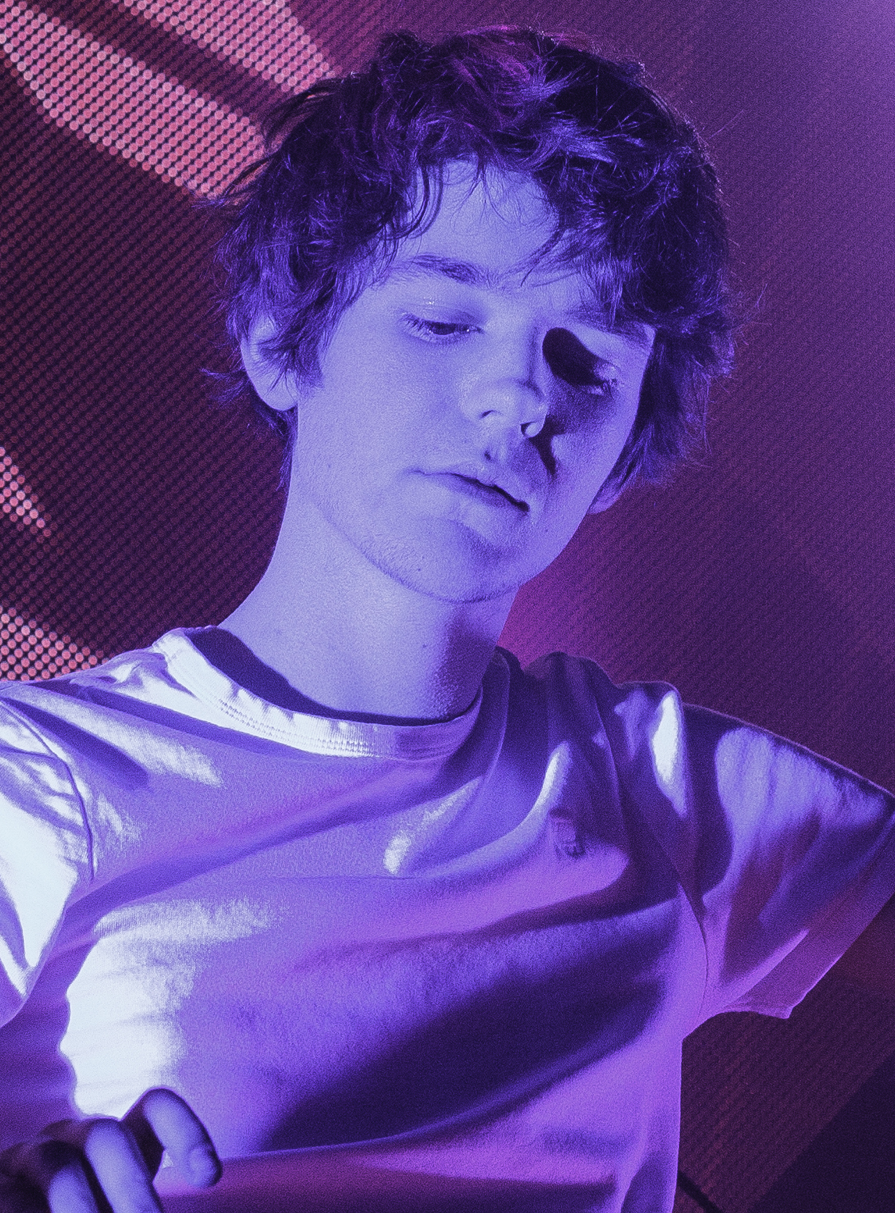 Madeon, Brussels Live, 04 april 2015